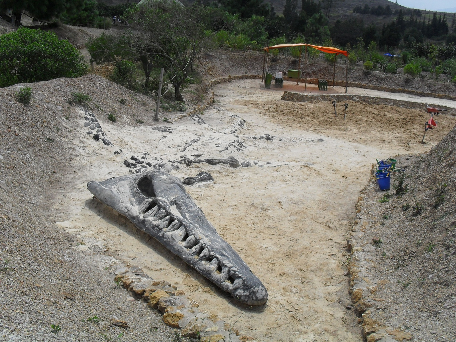 Excavación simulada de un Plesiosaurio de 12 metros en el Parque Temático Gondava, en el departamento de Boyacá, Colombia